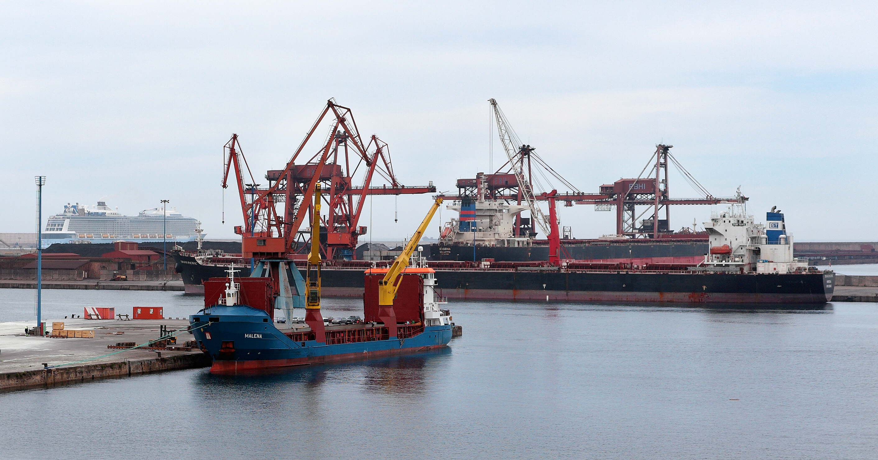 Diversos tráficos en el Puerto de Gijón